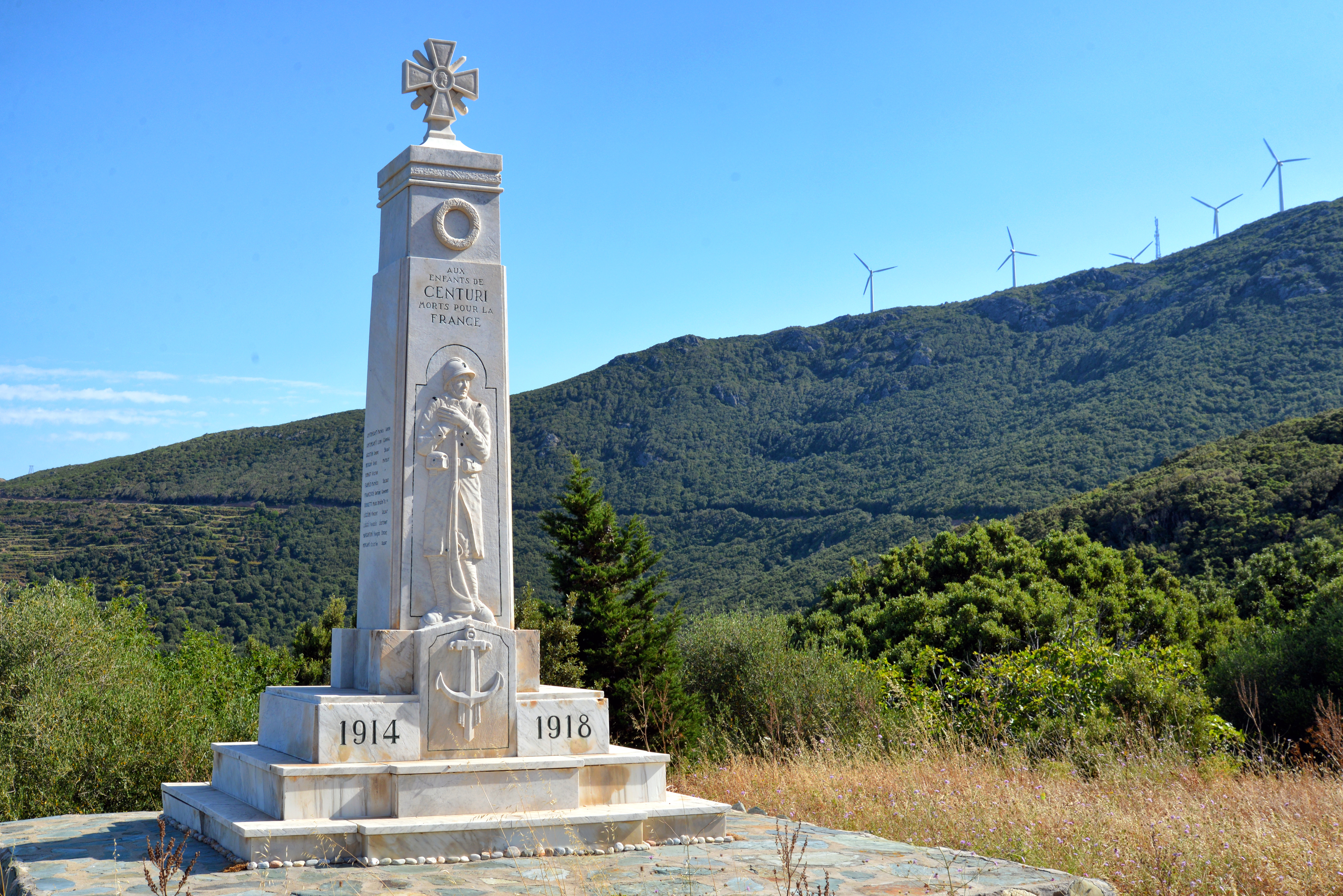 Centuri, Cap Corse (Corse) - Monument aux morts près de l'église Saint-Sylvestre